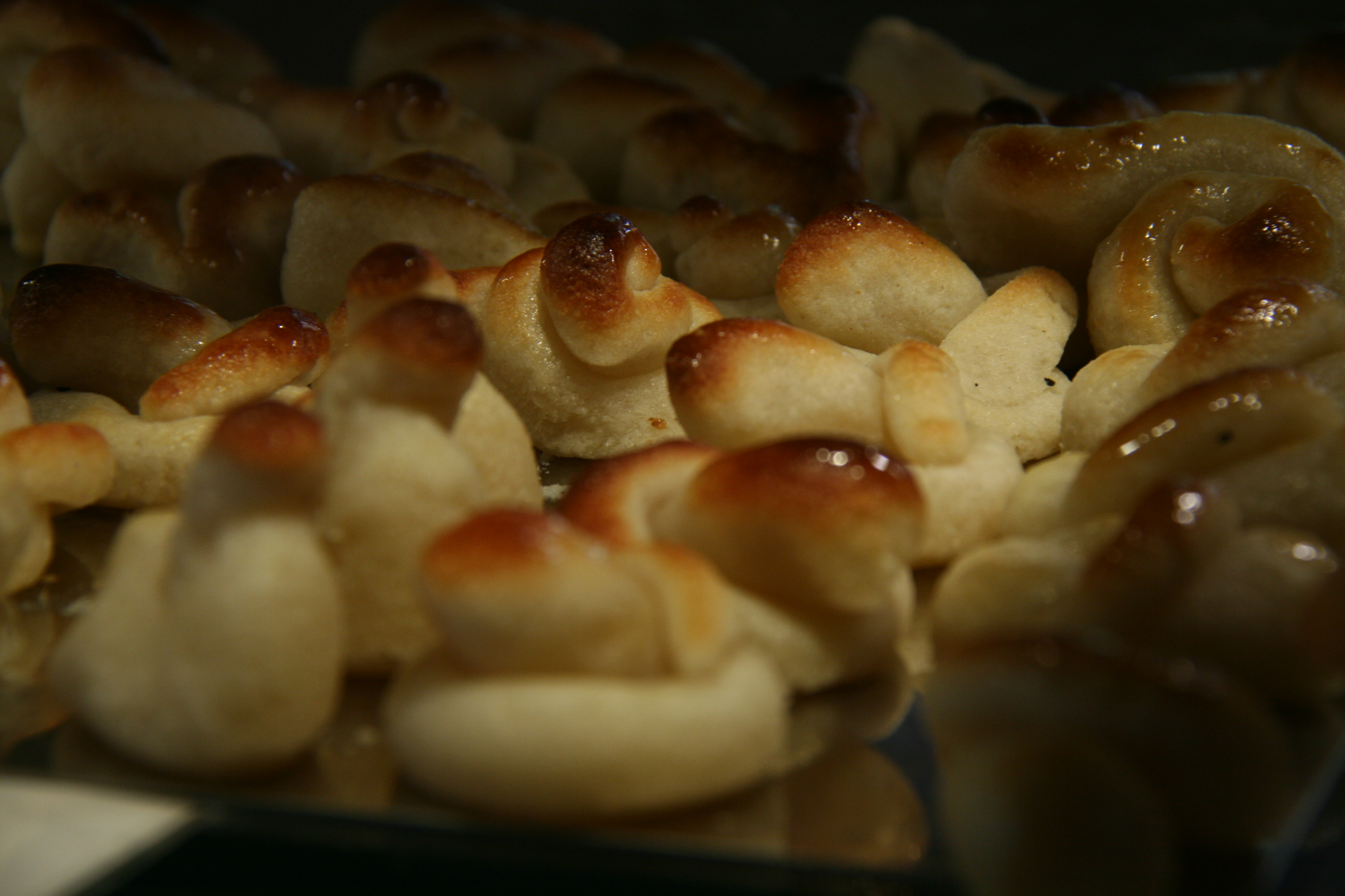 Mazapán